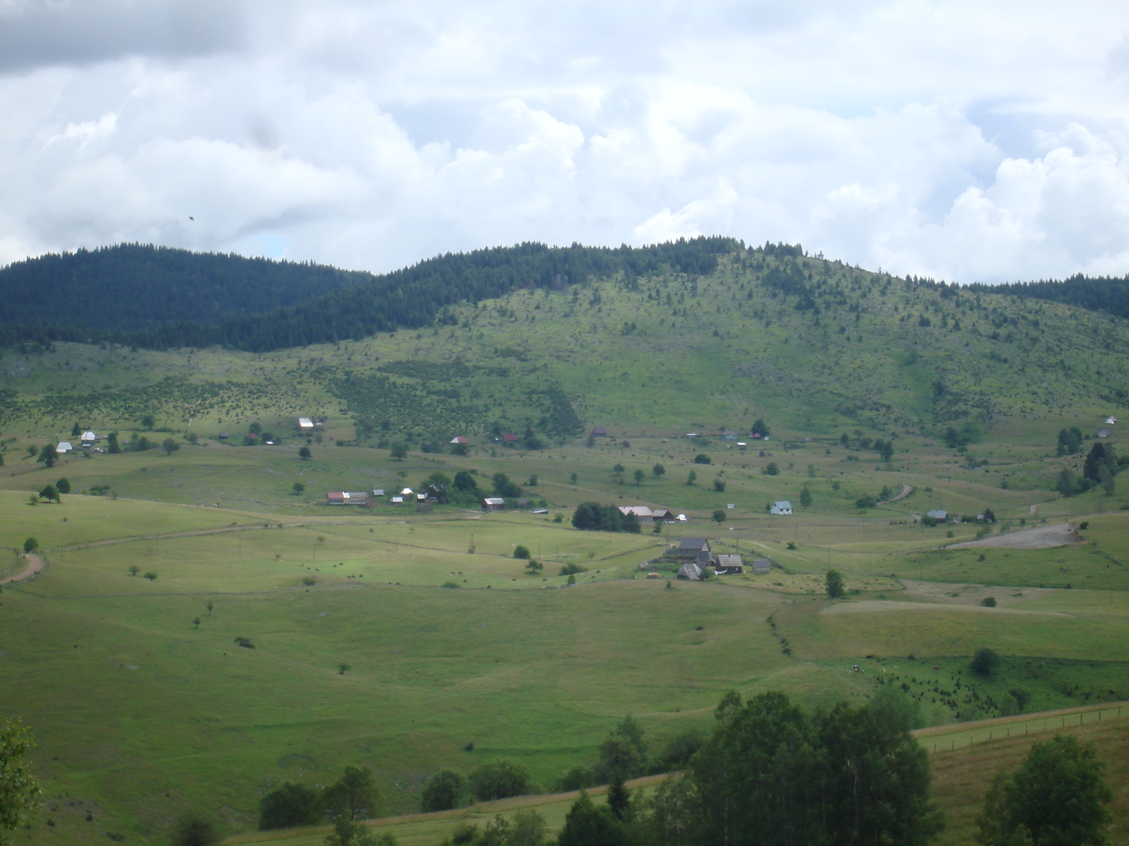 Selo Krupice 2014